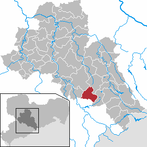 Eppendorf in Saxony - district Mittelsachsen